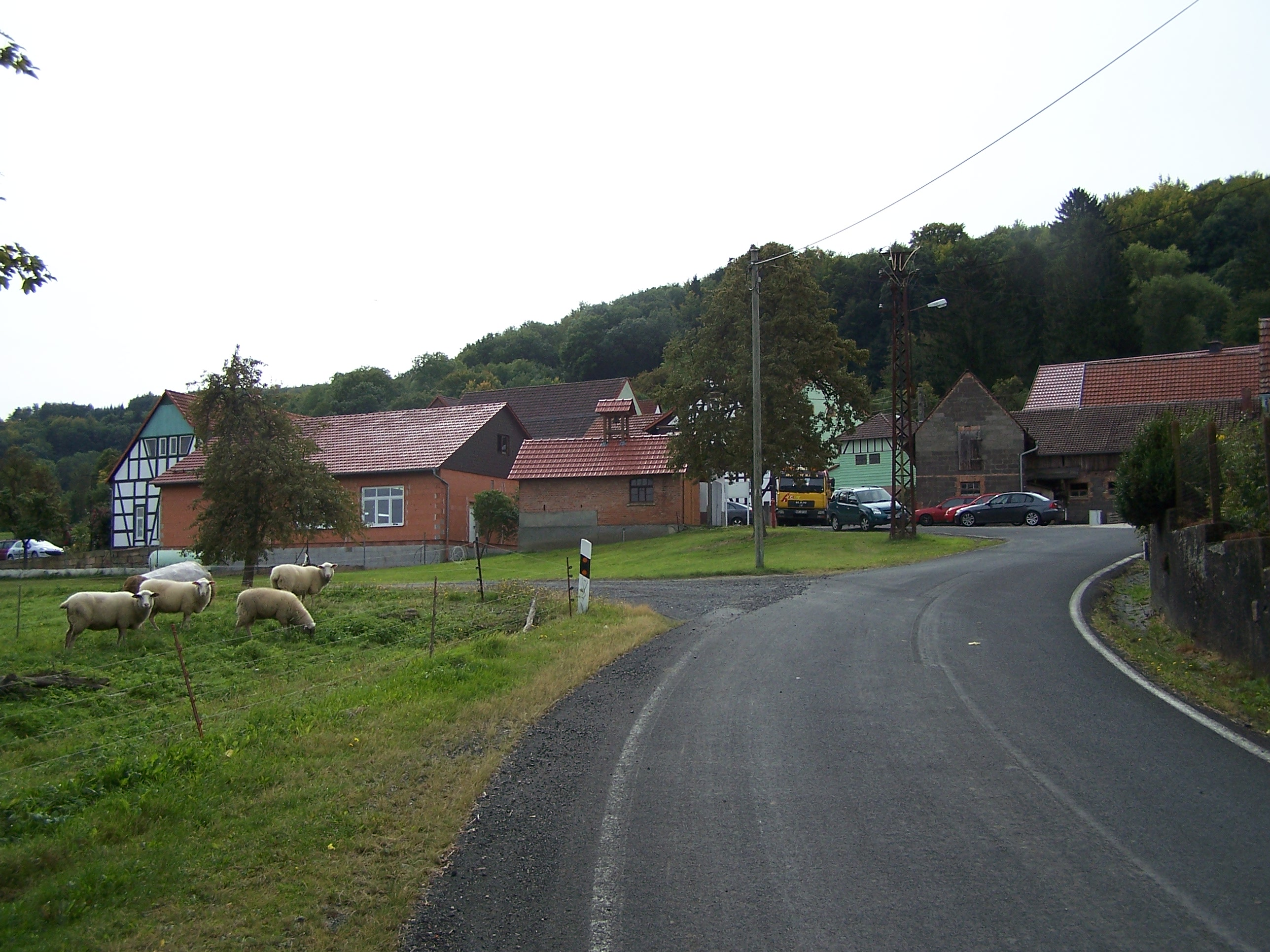 Ortsansicht von Norden.